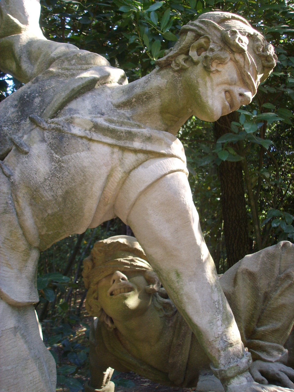 Boboli, terzo incrocio del viottolone, Orazio Mochi e Romolo del Tadda, i giocatori del saccomazzone (1780)